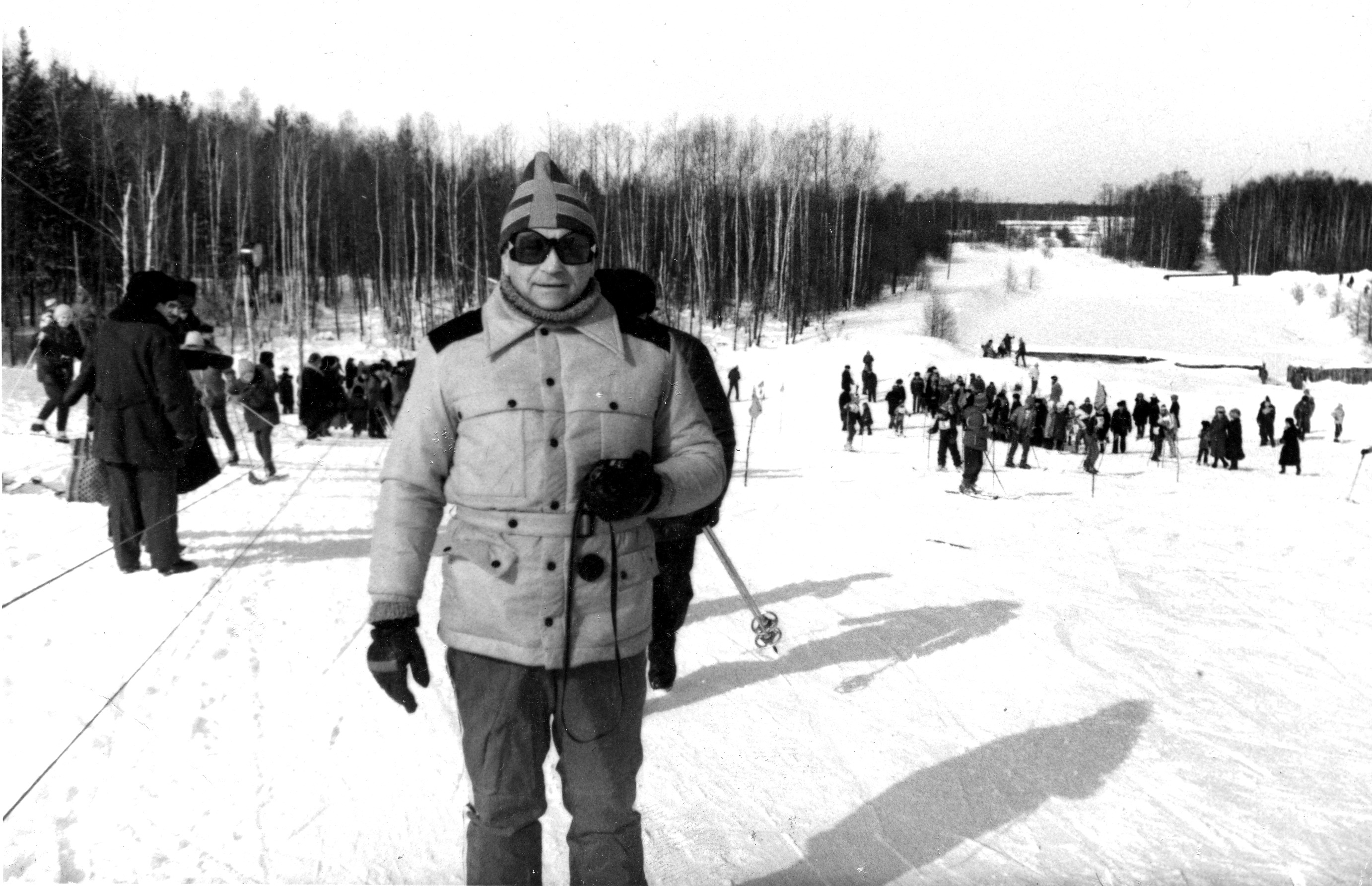 Соревнования в 1978 г. Л.Л. Перчук на переднем плане